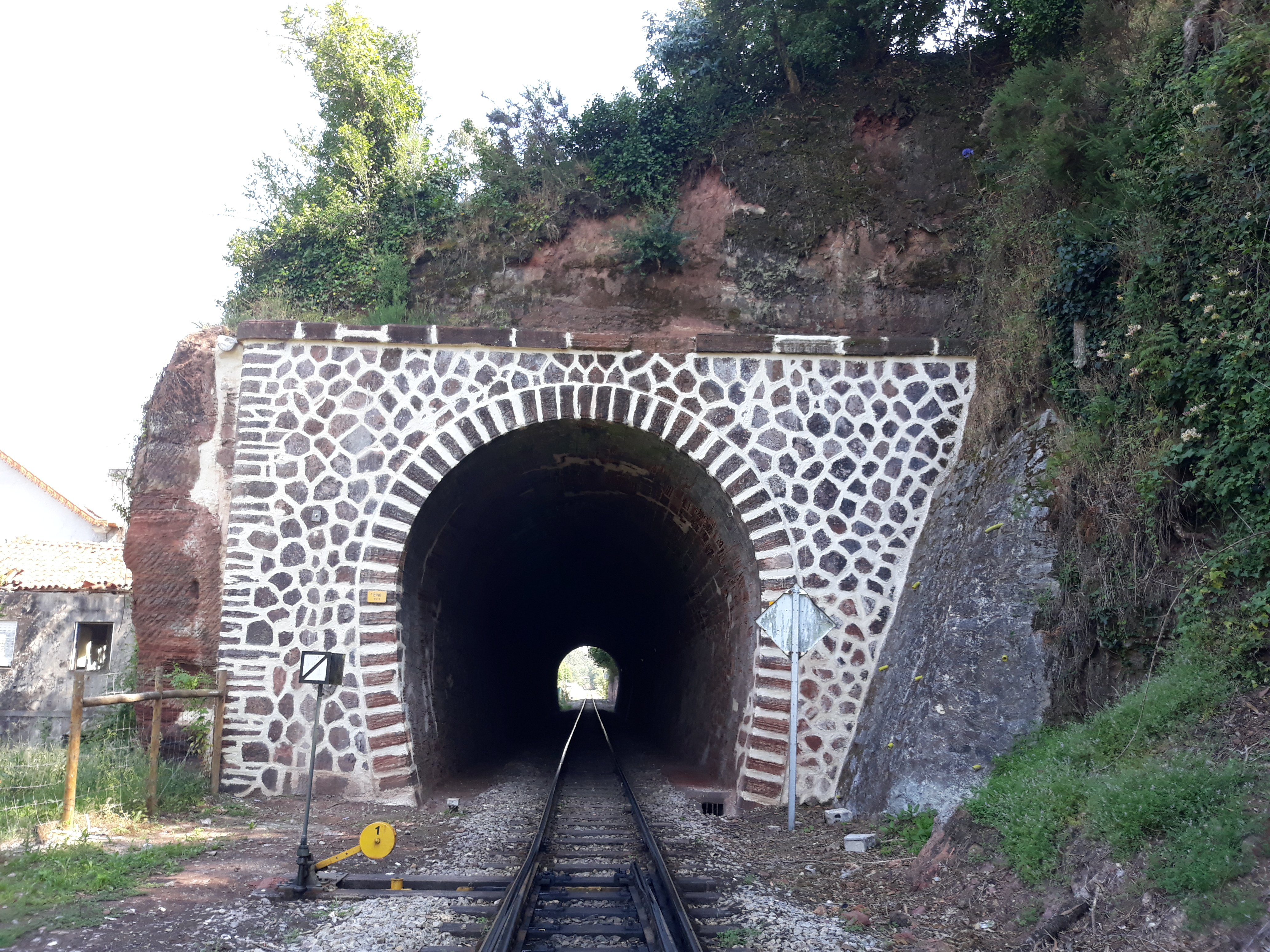 Túnel de Eirol com 72 metros de comprimento construído em grés de Eirol